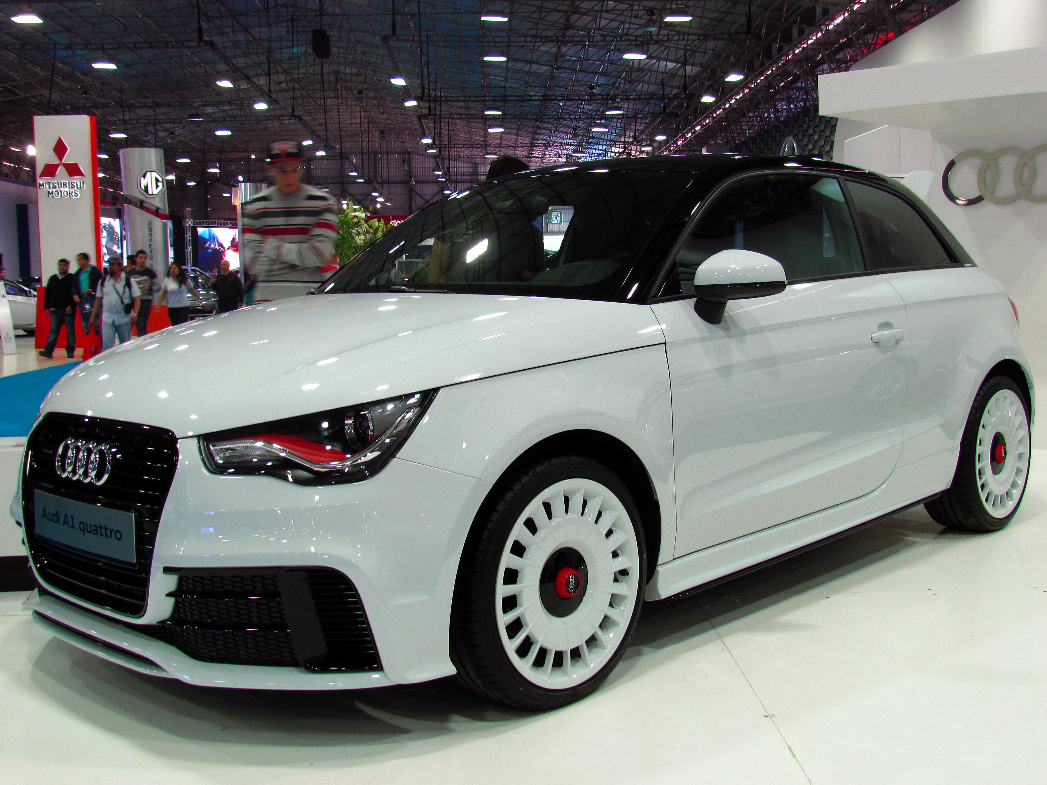 Audi A1 2.0T Quattro 2012